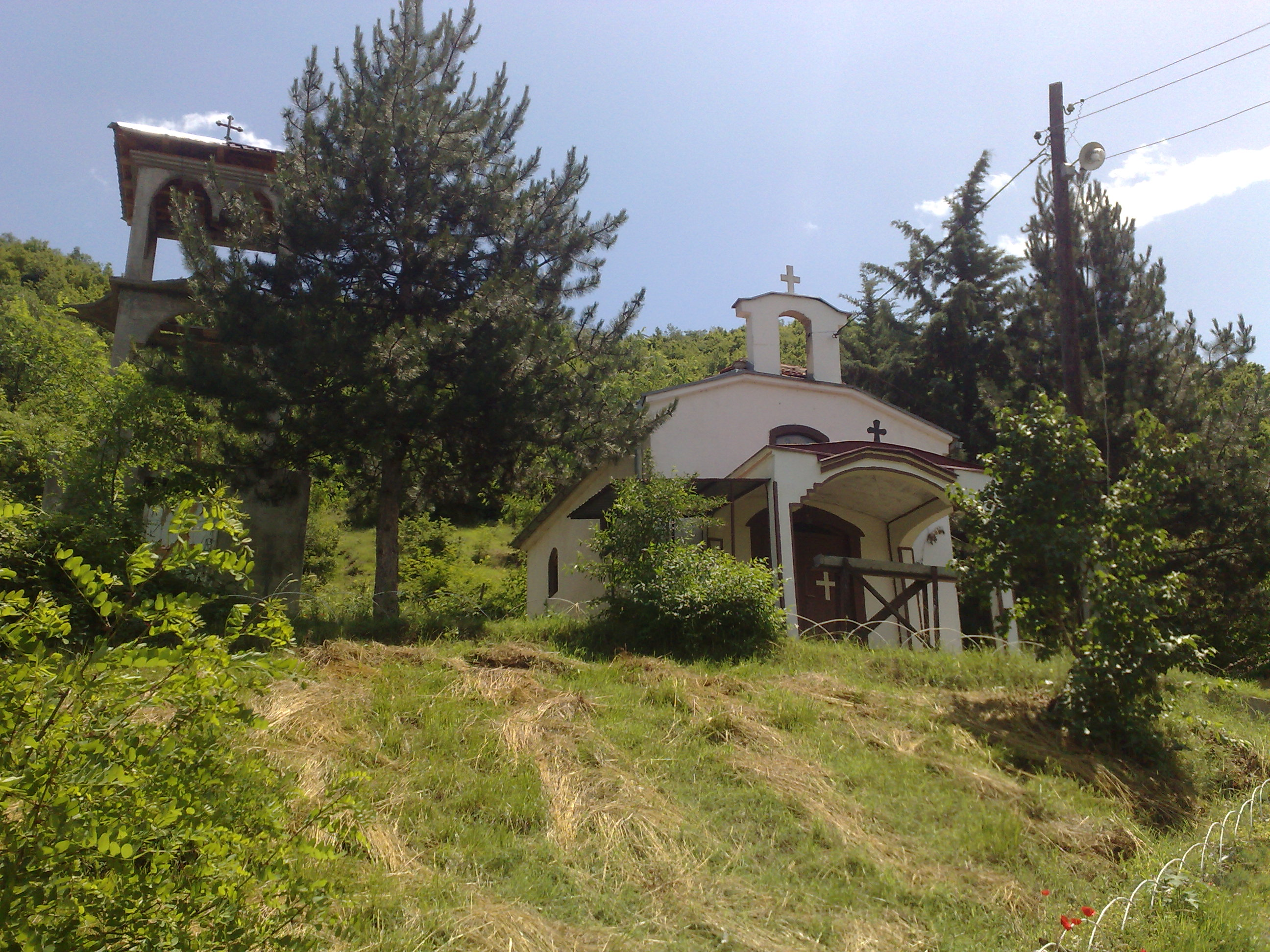 Црквата Свети апостоли Петар и Павле во Пакошево